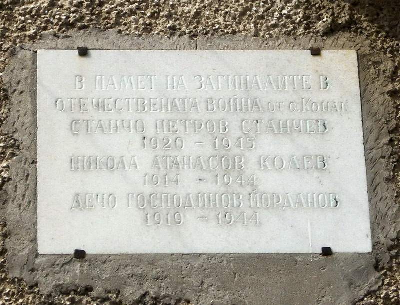 Паметна плоча, поставена на фасадата на Читалището с имената на загиналите като войници през Втората световна война жители на село Конак, община Попово